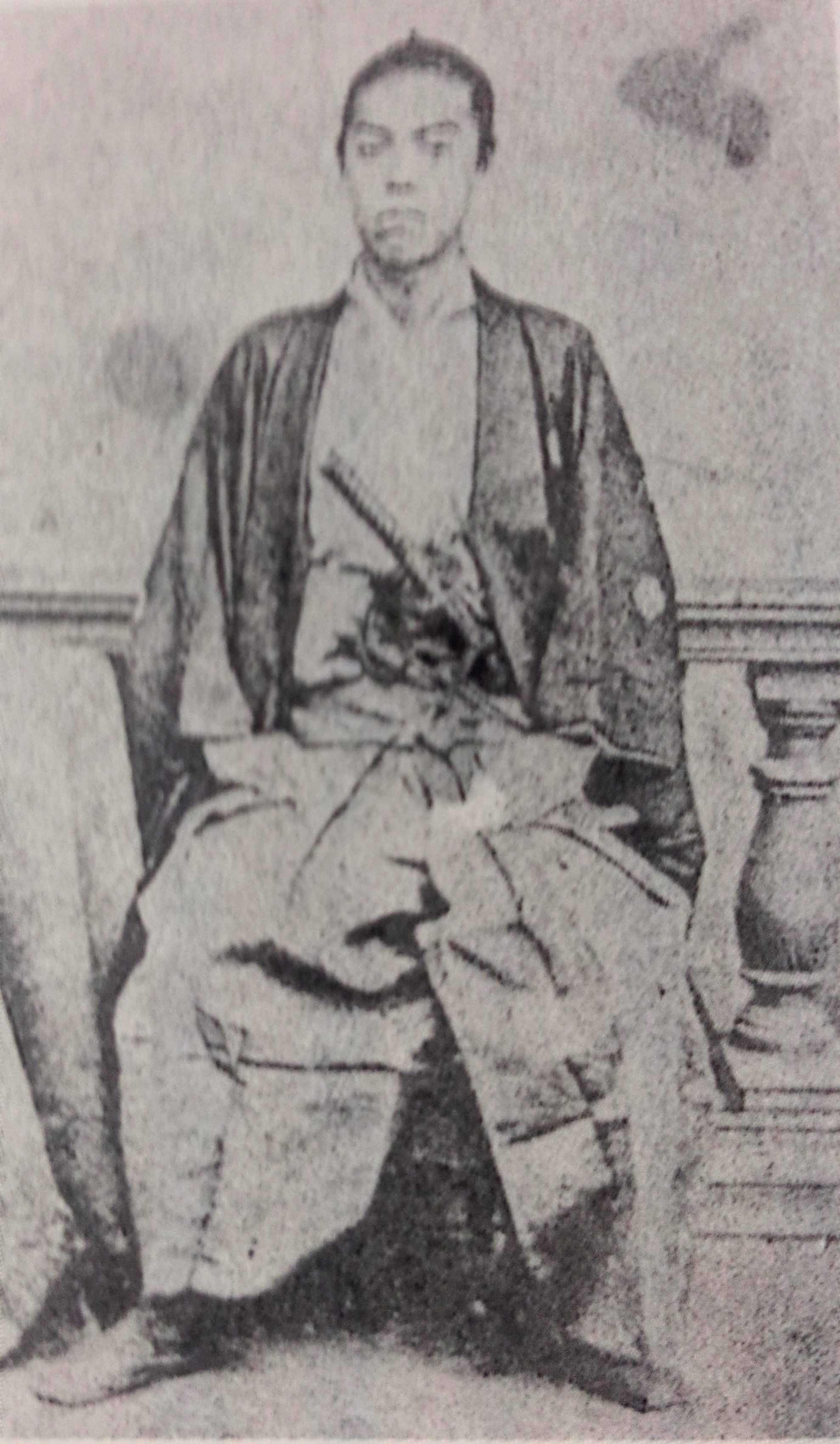 松平(本荘)宗武の肖像写真。